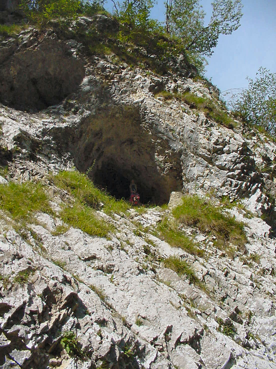 Grotta detta di San Miro